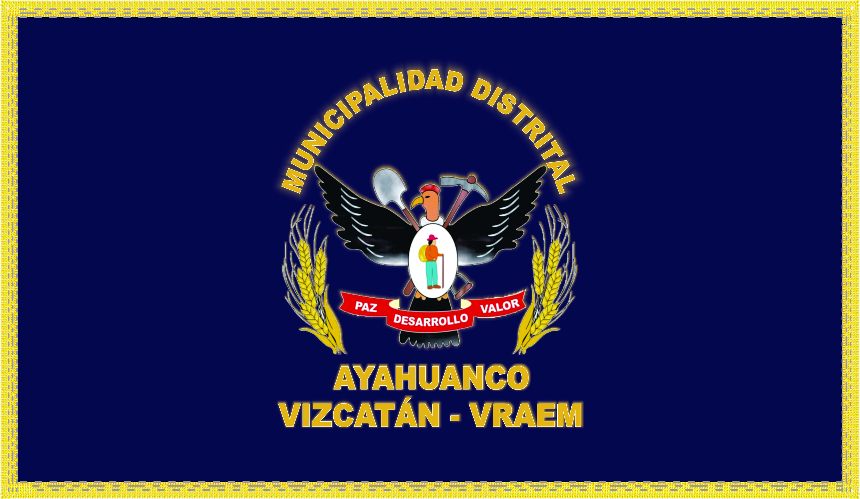 bandera de la municipalidad de ayahuanco